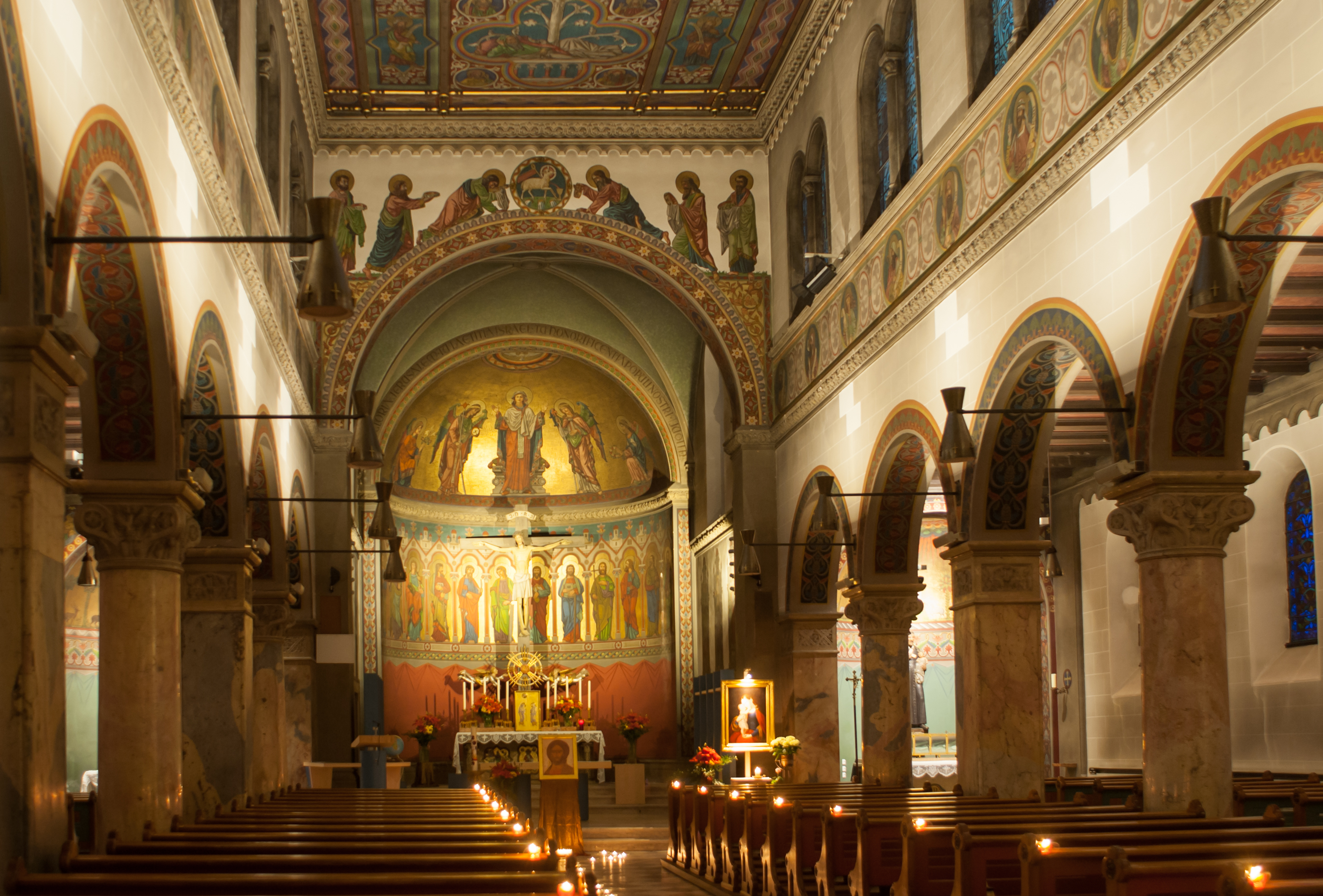 Klosterkirche Maria Unbefleckte Empfängnis, Innsbruck. Aufgenommen in der Langen Nacht der Kirchen im Mai 2013